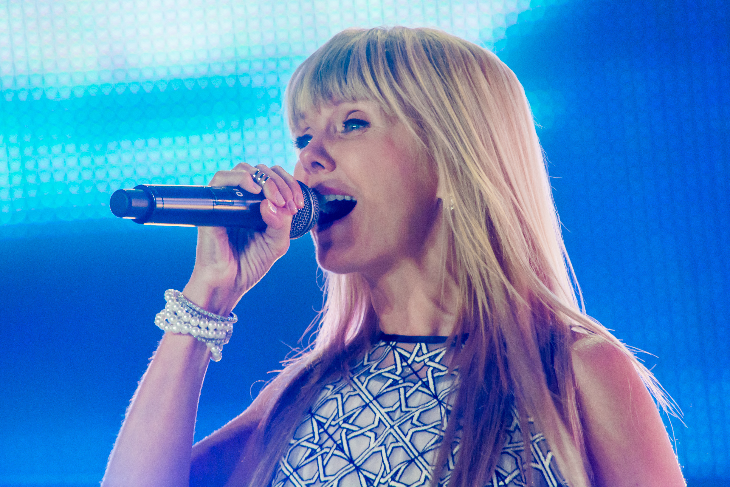 Валерия на Детской Новой волне 2016